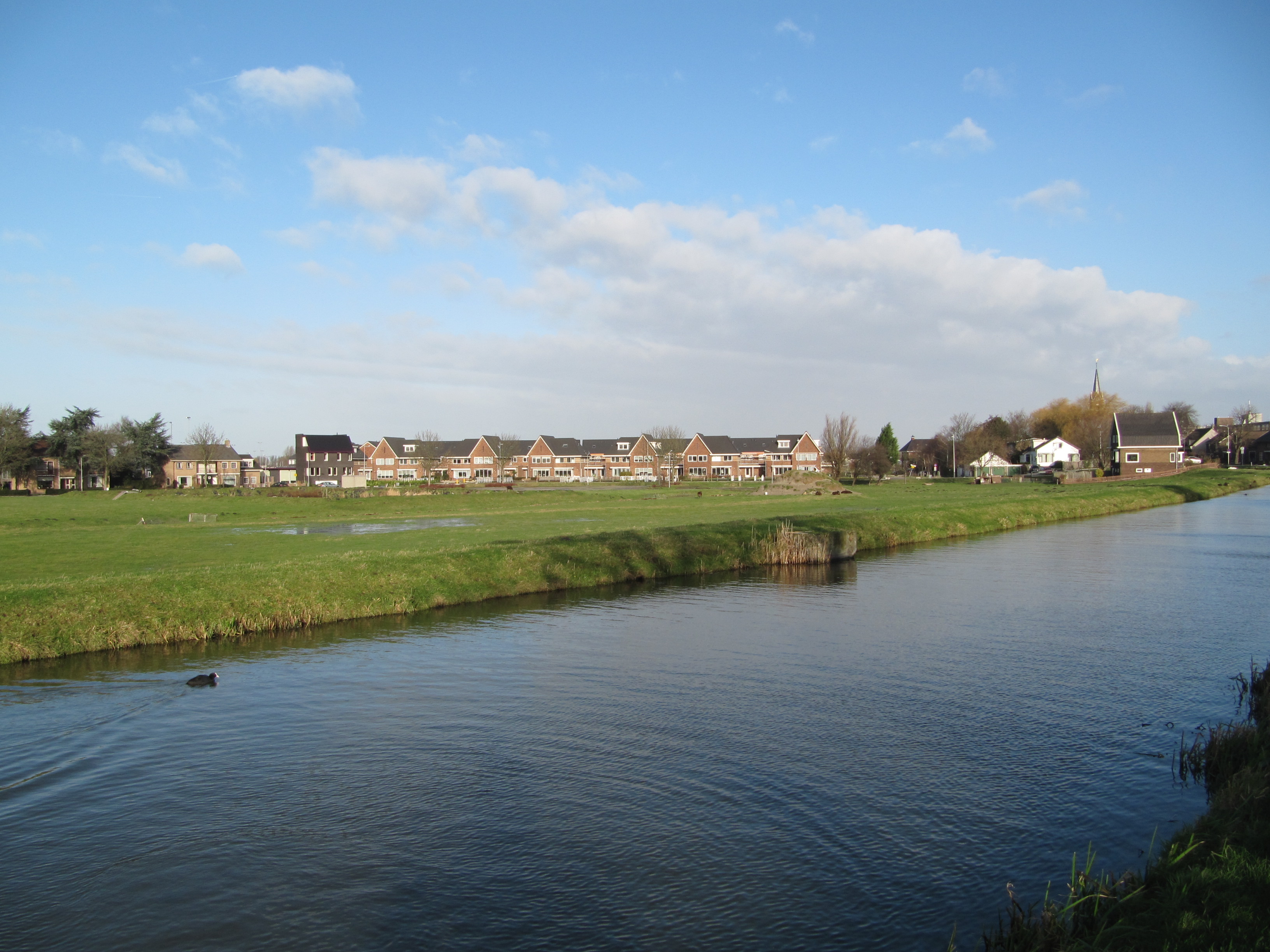 Noordeindseweg kade en polder